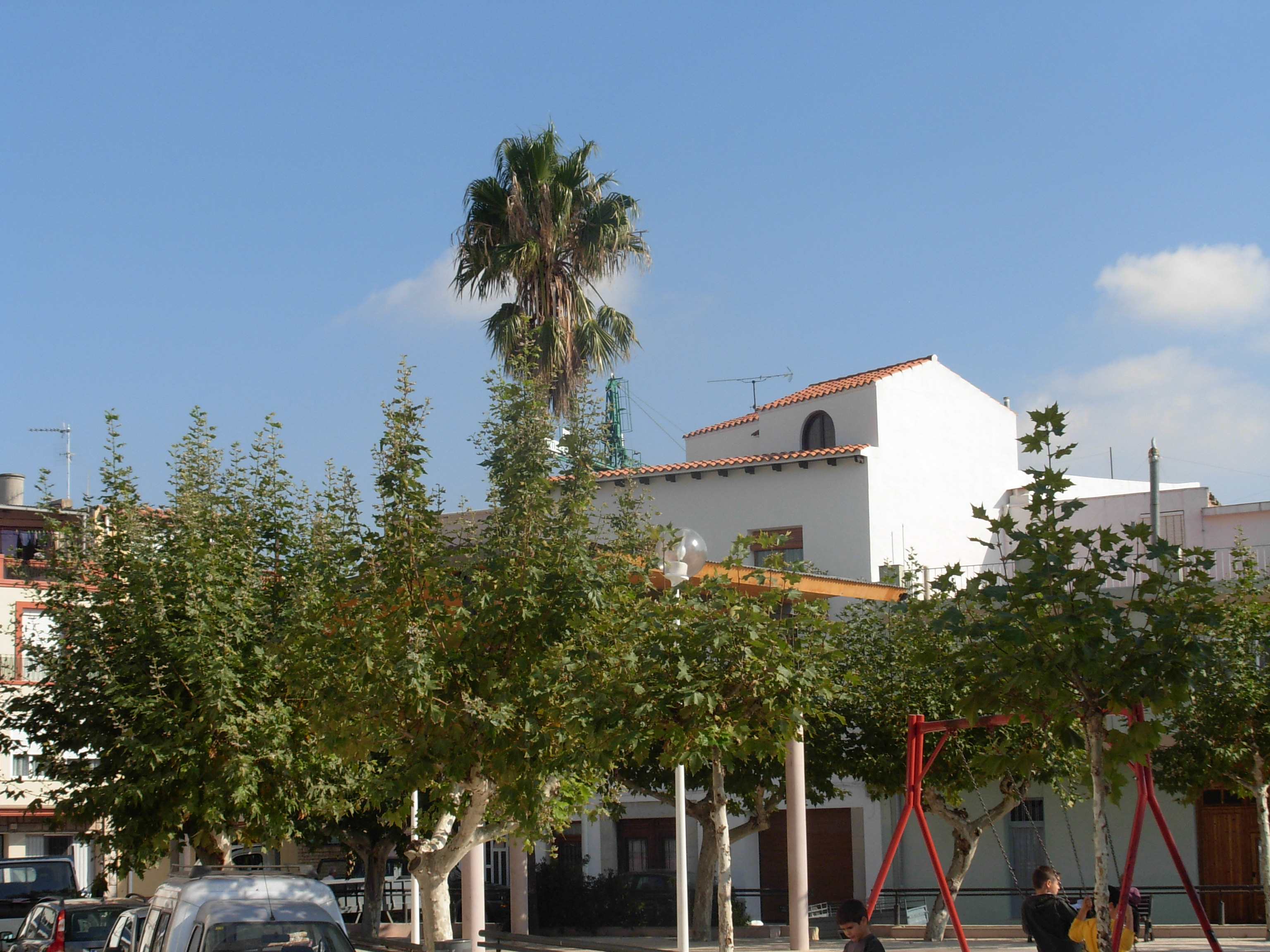 traiguera